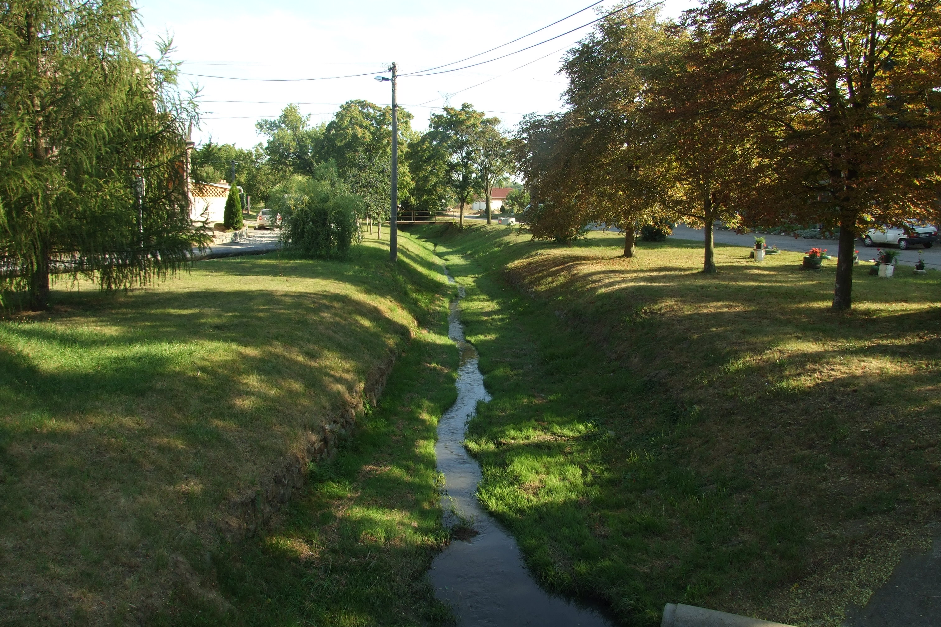 Sobotovice - potok Syrůvka